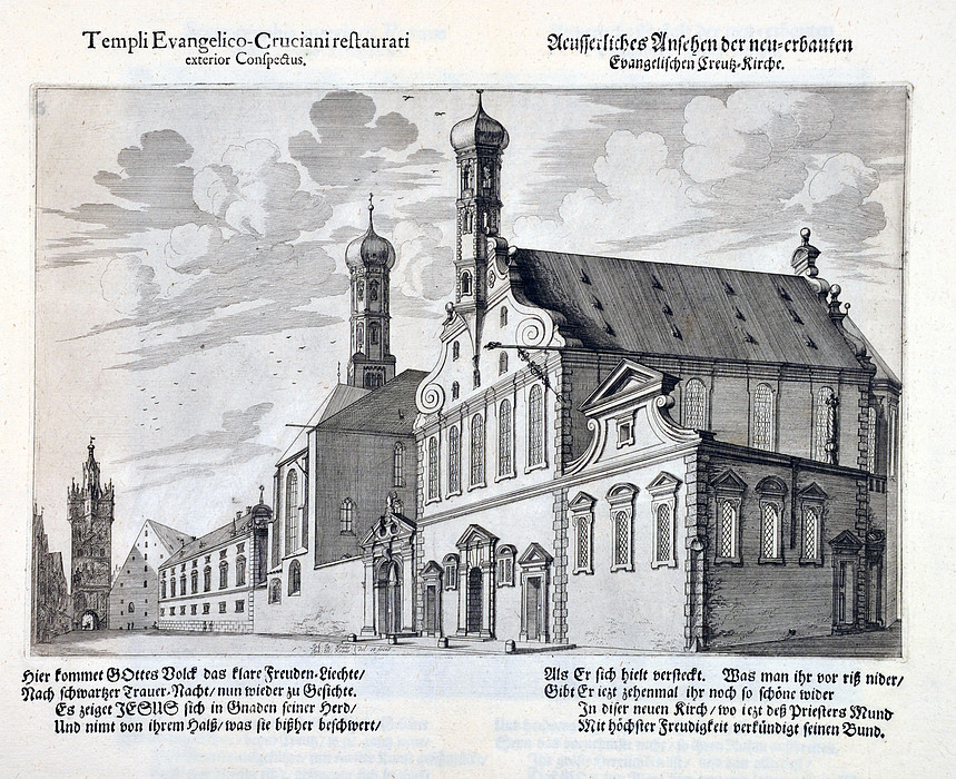 Auesserliches Ansehen der neu-erbauten Evangelischen Creutz-Kirche, aus: J. J. Kraus: Ichnographicae atque scenographicae delineationes templi Cruciani Evangelici Augustani. Das ist: Wahre und eigentliche Abbildung der alten Evangelischen Kirchen zum H. Creutz in Augsburg ..., wie auch der heutigen auf den alten Platz weit herrlicher und schöner neu-erbauten Evangelischen Kirchen. Zum andernmahl aufgelegt und vermehret und von M. S. H. mit wohlgefaßten Versen gezieret. Anjezo aber auf ein neues mit viel Sinnbilder außgezieret worden durch Johann Ulrich Kraußen. Augsburg 1703.